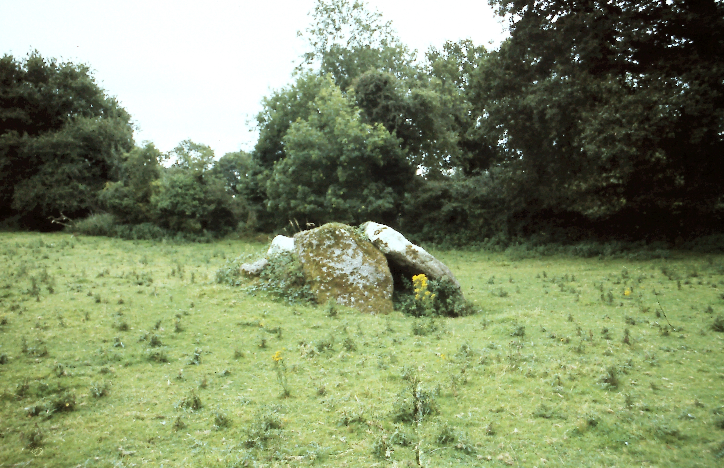 Owning Portal Tomb